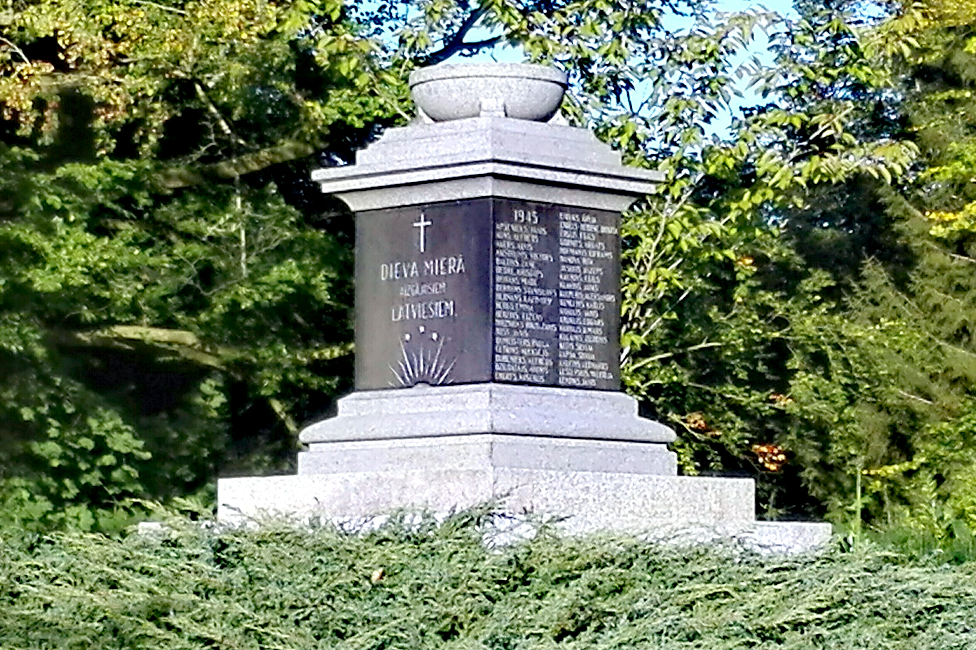 Lettische Kriegsgräberstätte auf dem Vorwerker Friedhof, Block 23, für Lettische Verstorbene des zweiten Weltkriegs. Die Namen der Lettischen Opfer von 1945 bis 1950 sind verzeichnet.